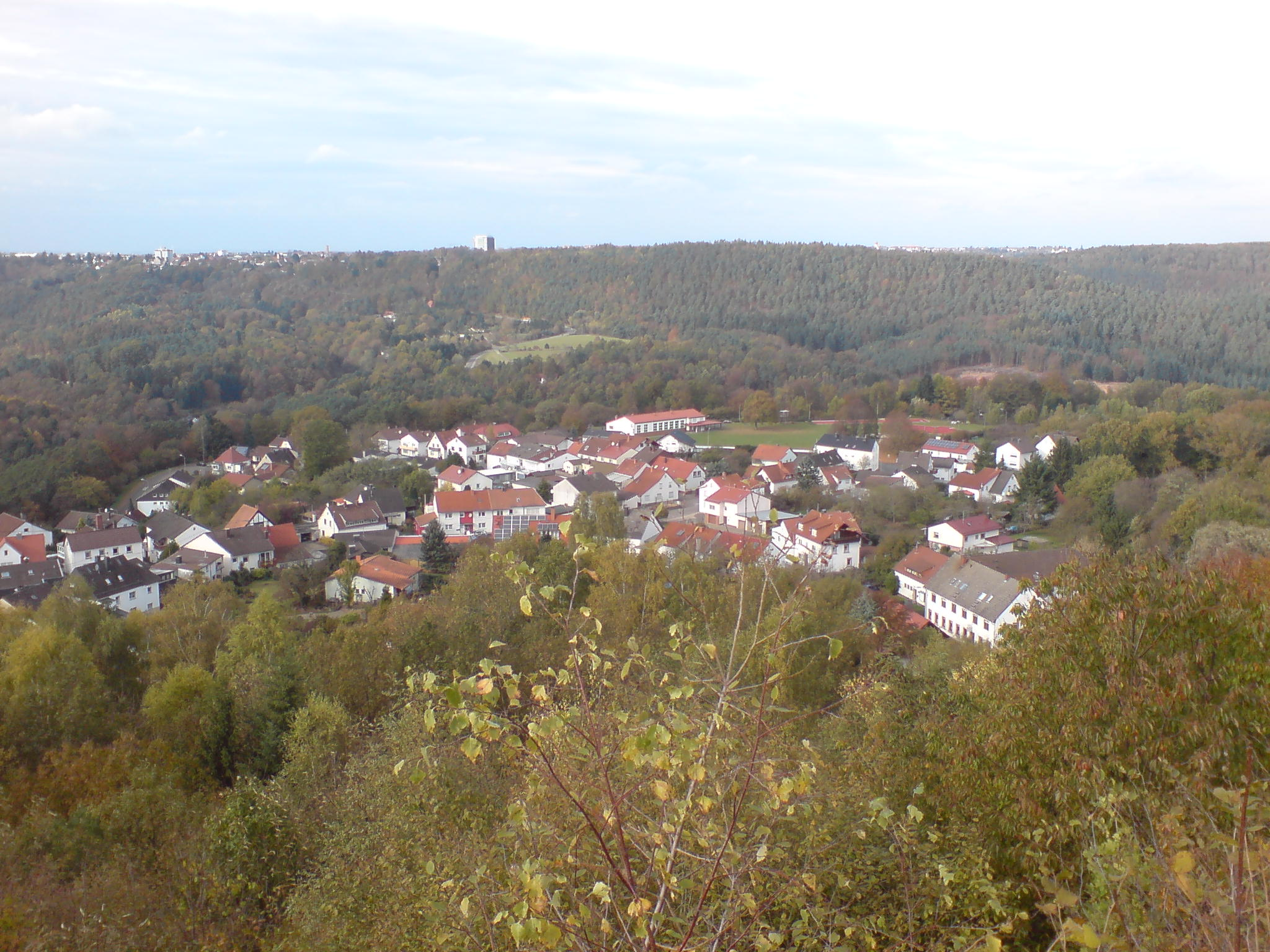 Blick über Lemberg.